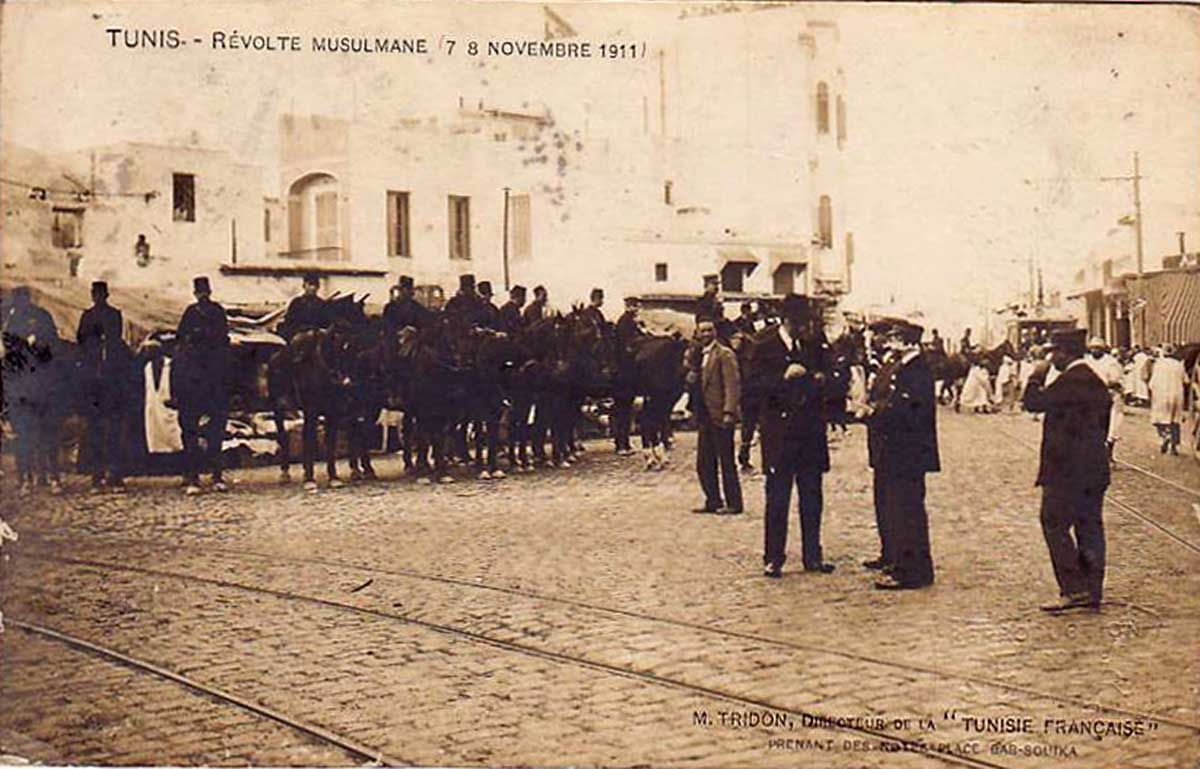 Emeutes du Djellaz Tunisie Novembre 1911